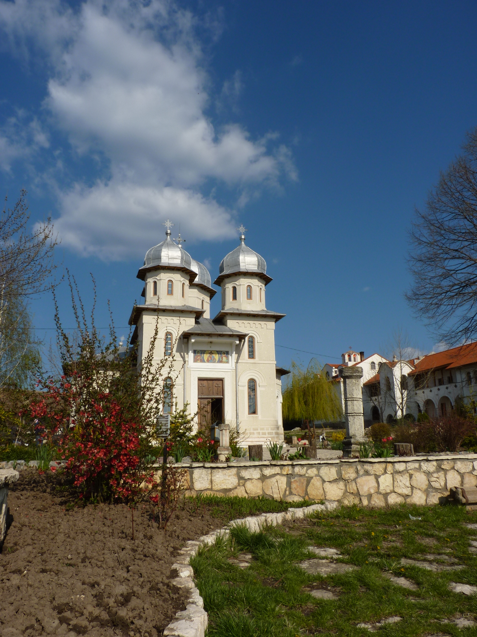 Manastirea Dervent, Judetul Constanta. Primavara 2011